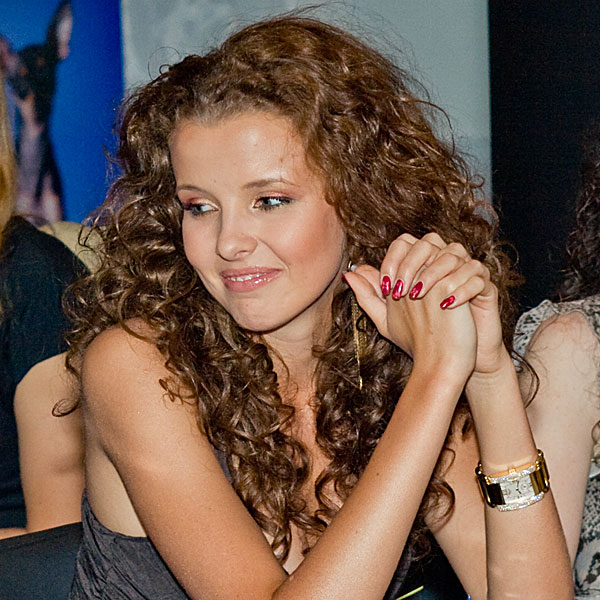 Inna Tsymbalyuk in 2008